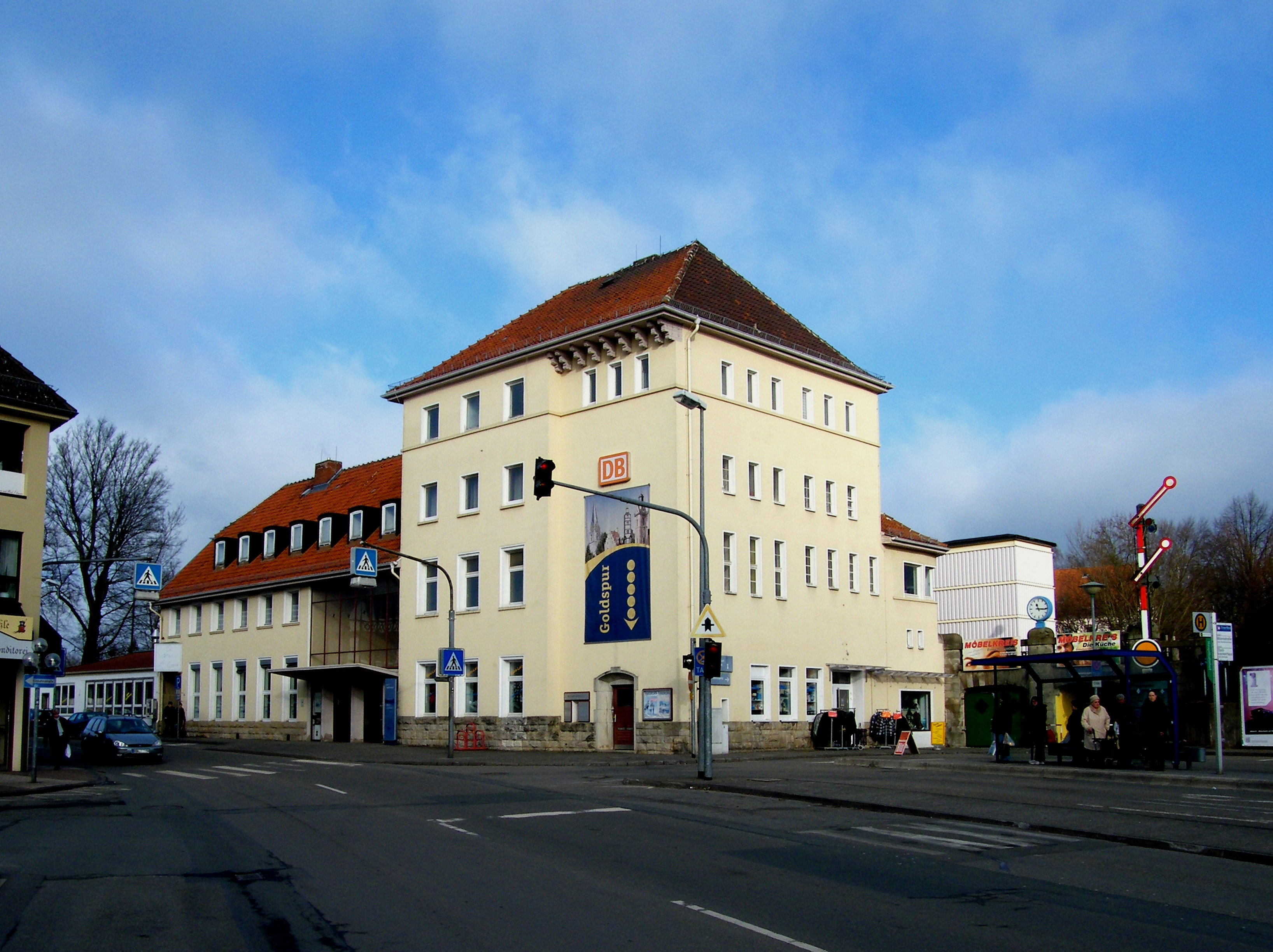 Bahnhofsgebäude Bahnhof Korbach (Straßenseite), Am Hauptbahnhof 10